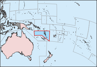 Map in Vanuatu